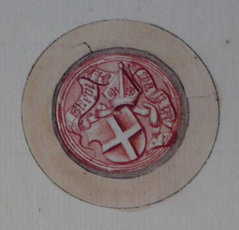 Seglmerket til Hoskuld Hoskuldson